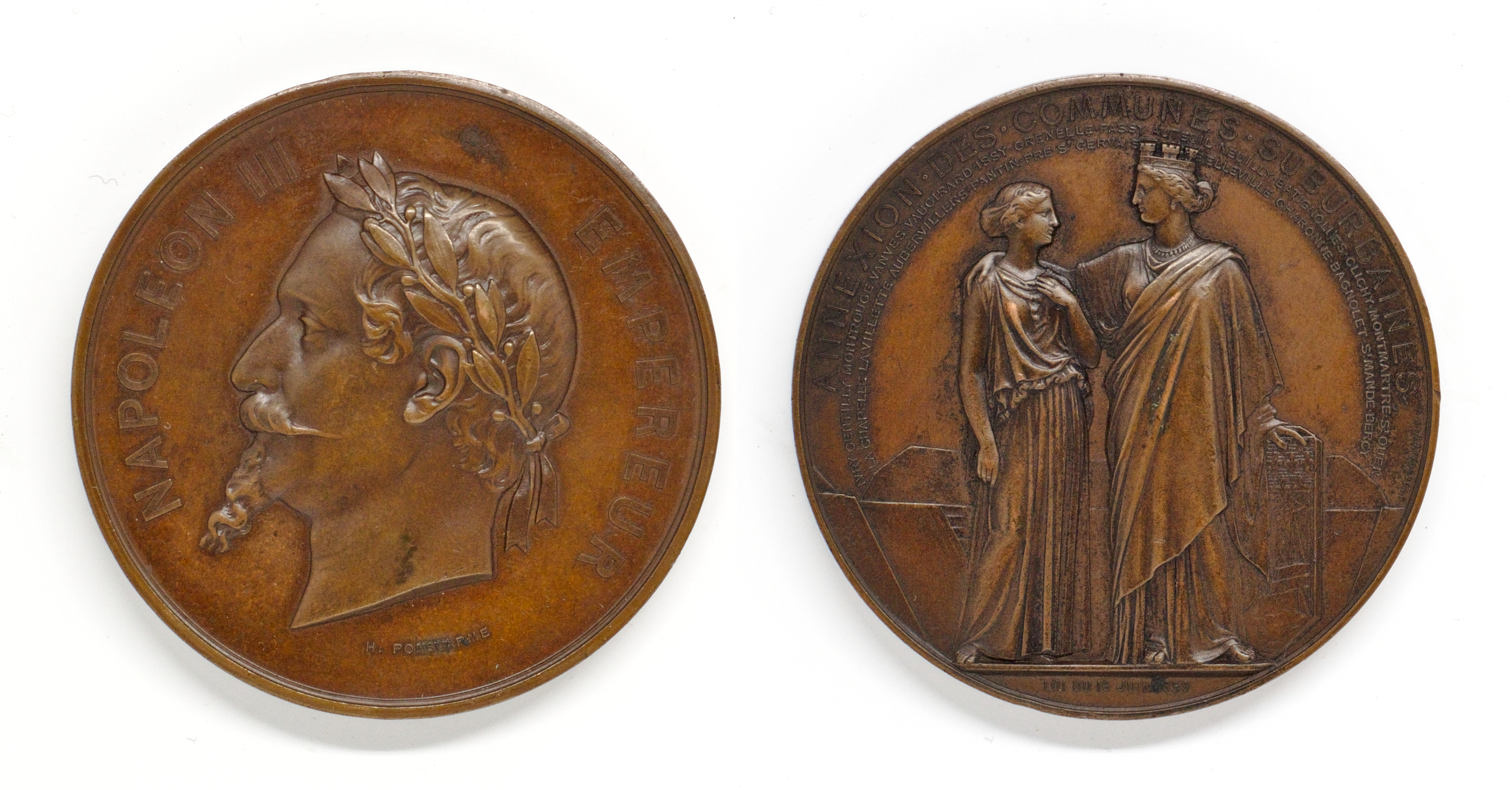 Médaille de Napoléon III - Annexion des communes suburbaines - Ponscarme - 1859